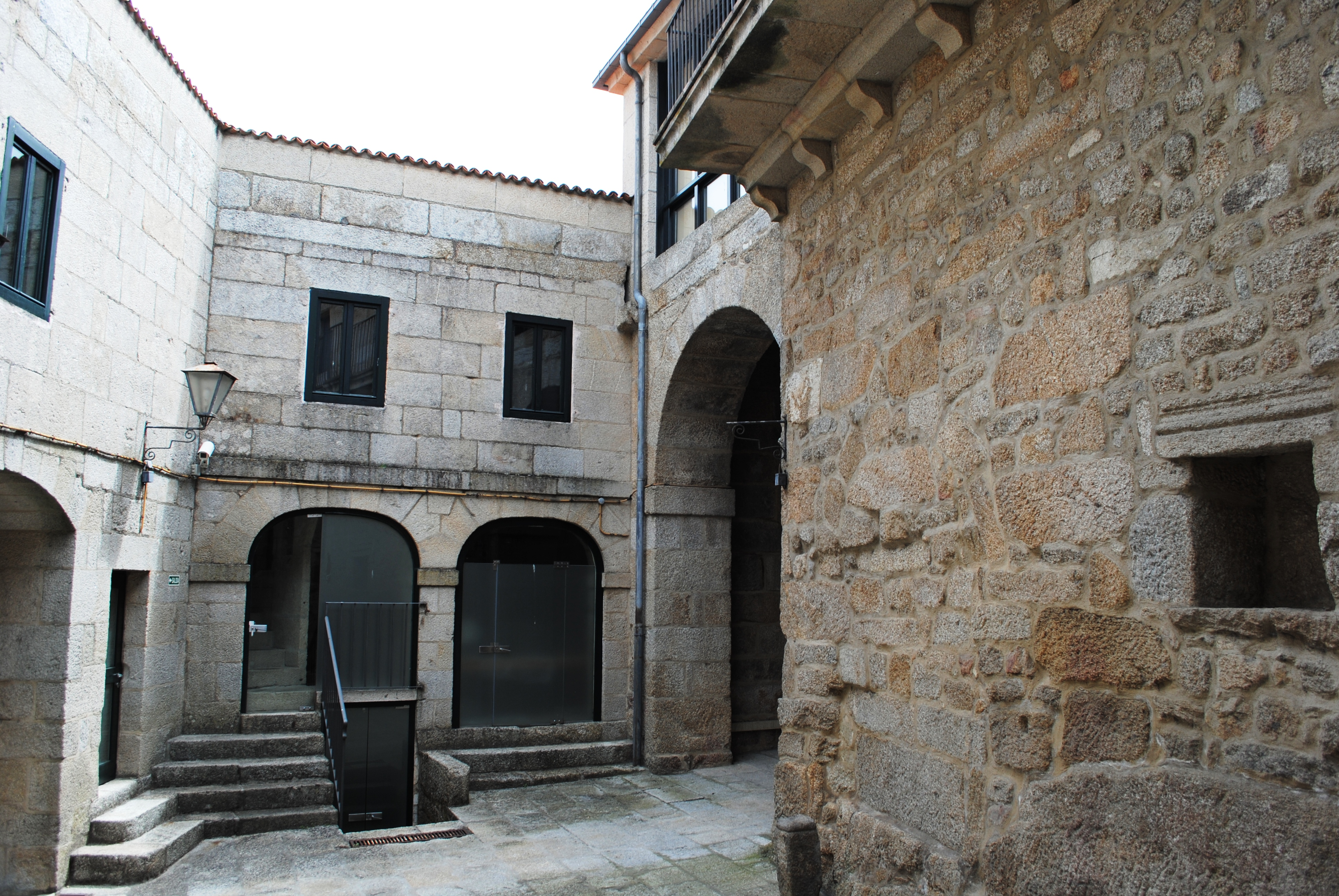 véxase o título e as categorías